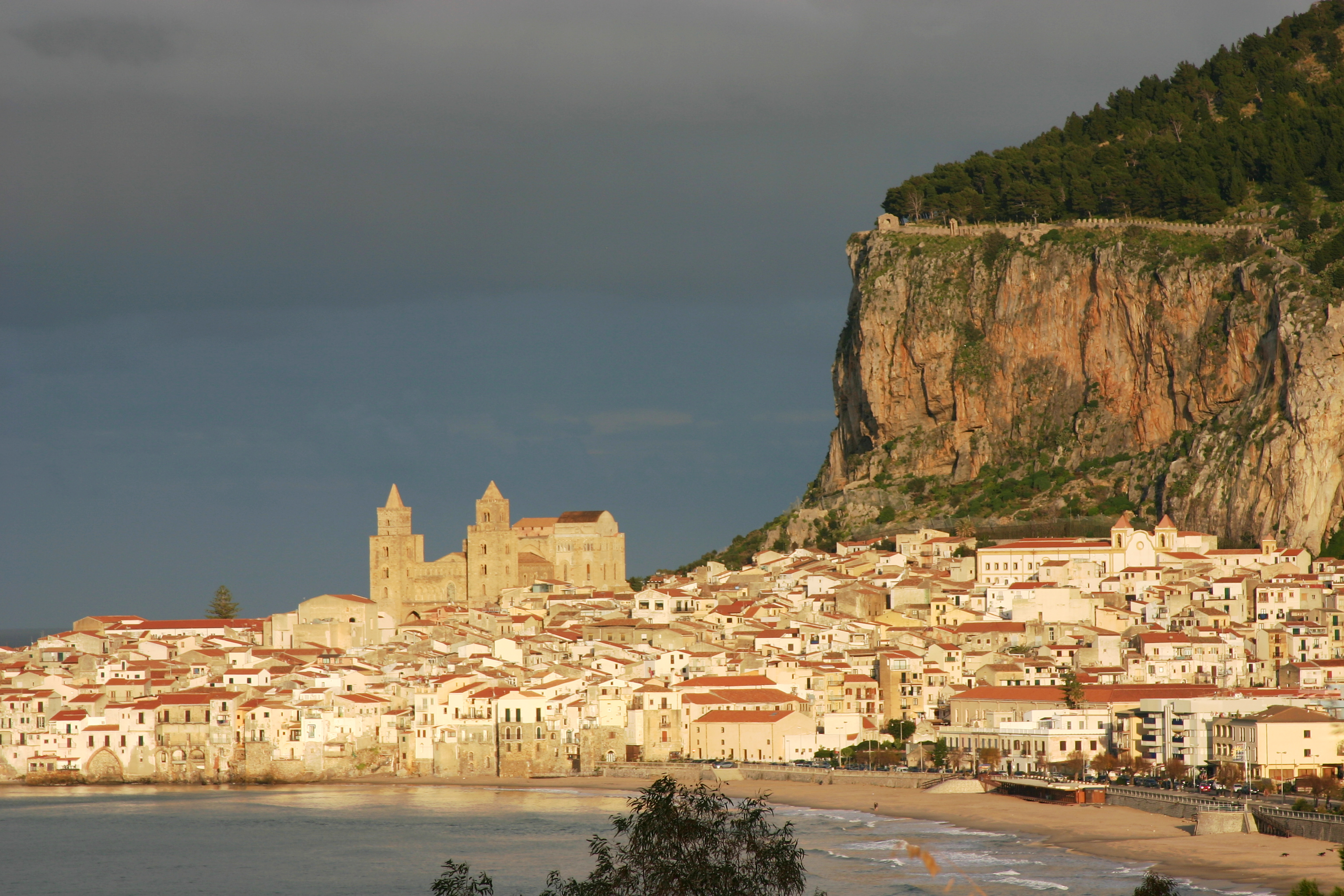 Cefalù